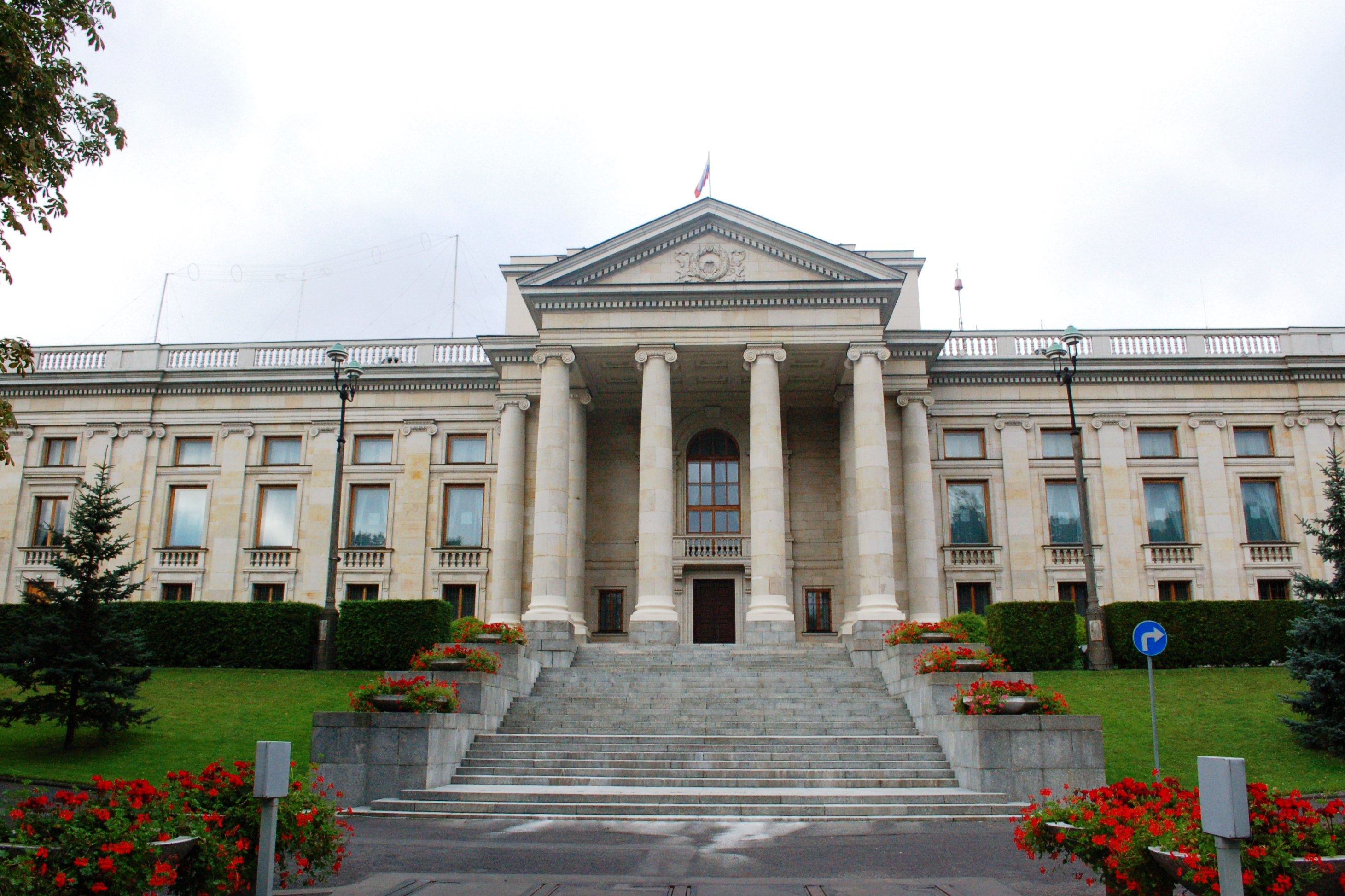 Russische Botschaft warschau, Frontseite, Belwederska